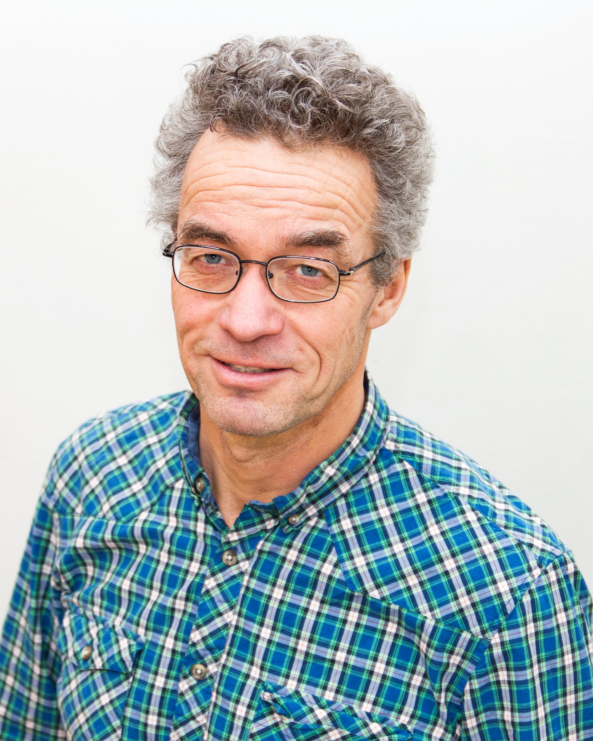 Rasmus Hansson, 1. kandidat for Miljøpartiet De Grønne i Oslo ved Stortingsvalget i 2013 og tidligere generalsekretær i WWF-Norge